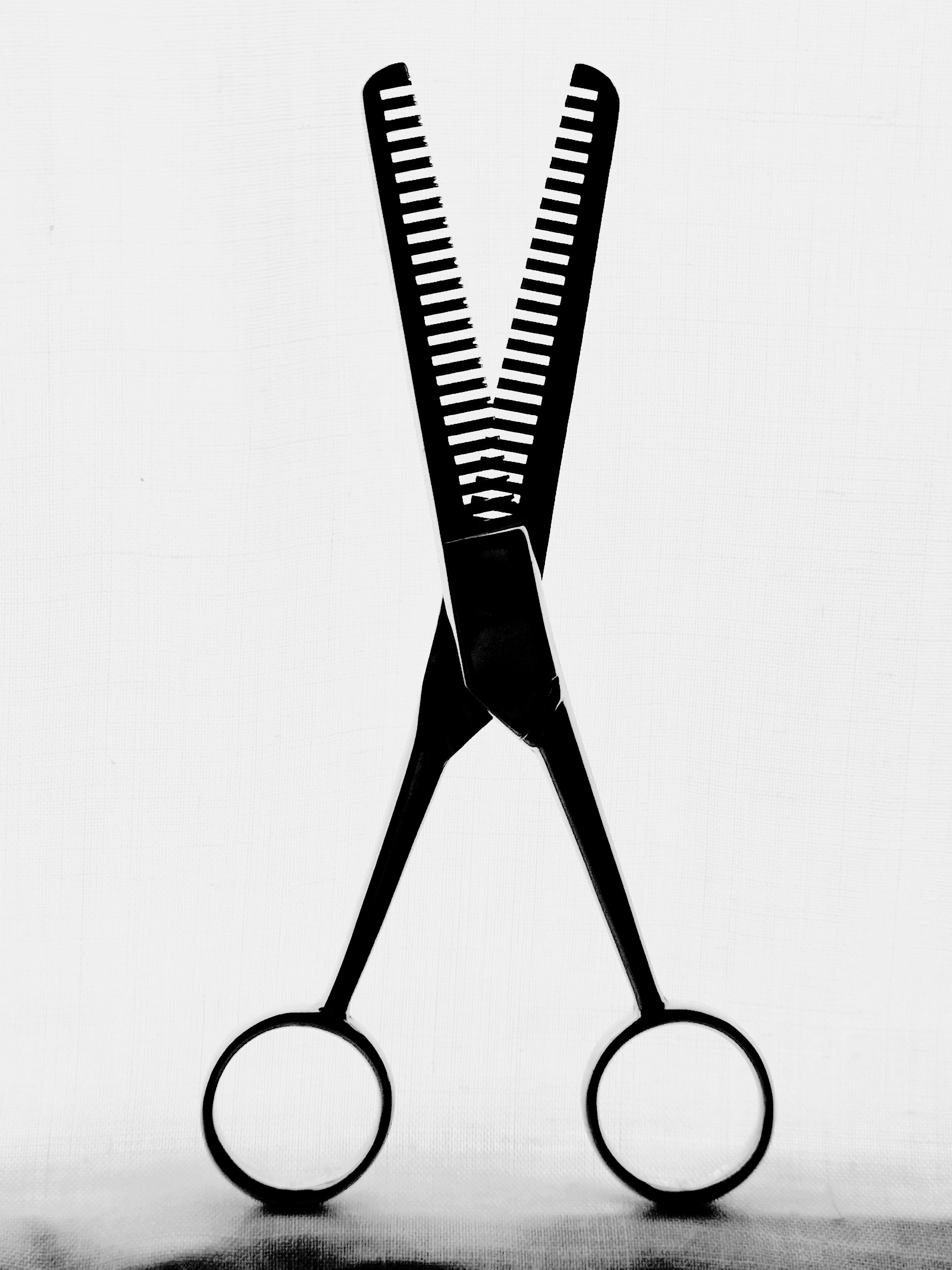 Forbici per parrucchiere